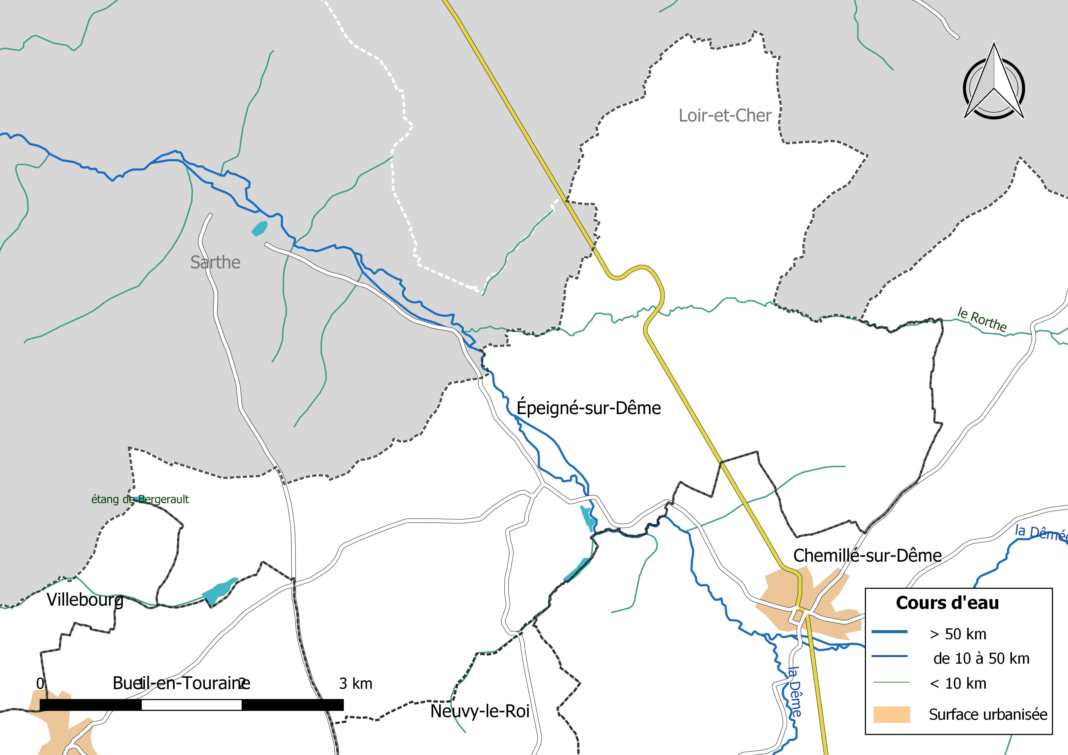 Carte du réseau hydrographique de la commune de Épeigné-sur-Dême (France).